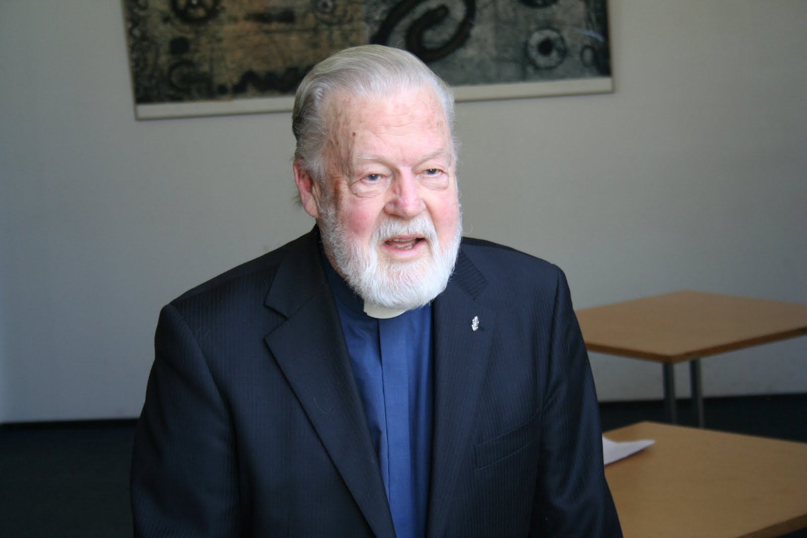 Vello Salo Eesti Kirjanike Liidu üldkogul 2011. aastal.